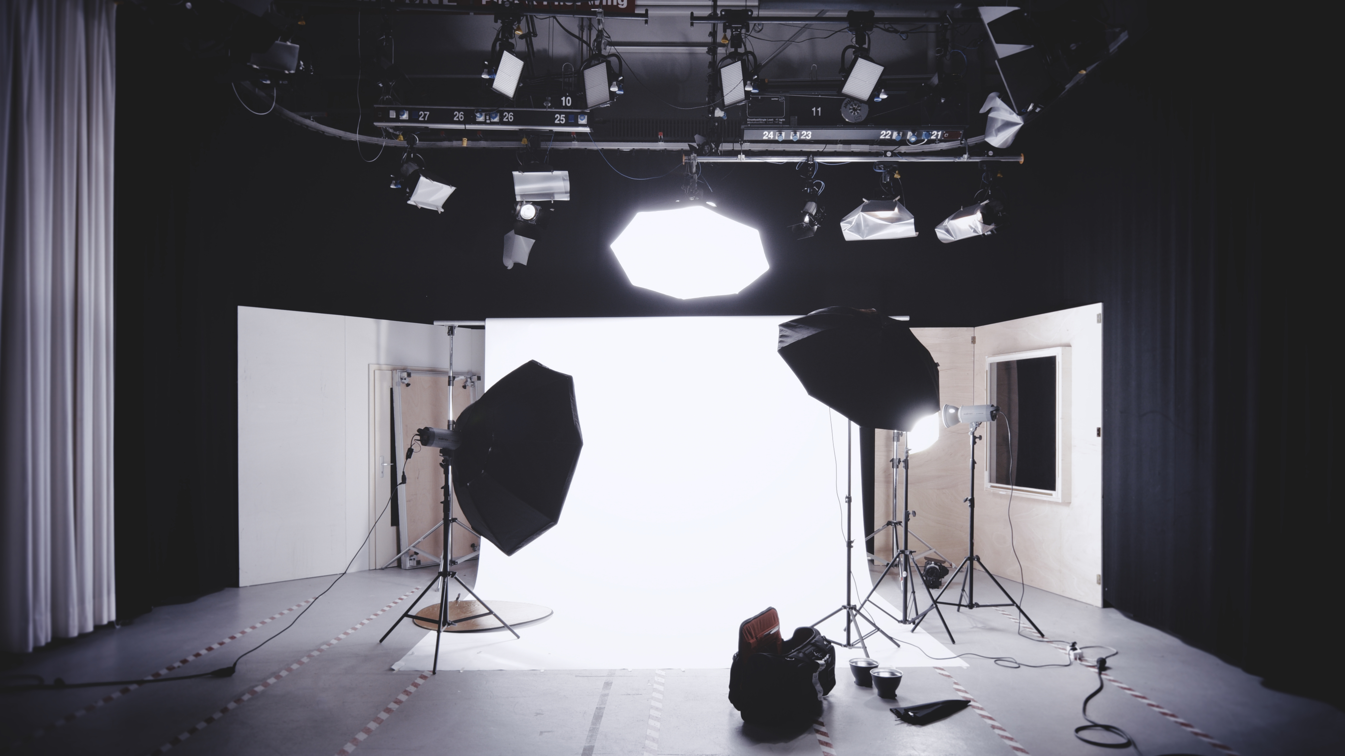 Foto d'estudi amb focos